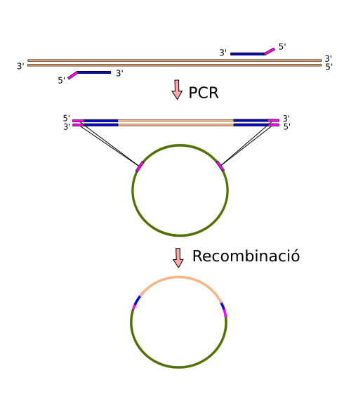 Recombinació en PCR